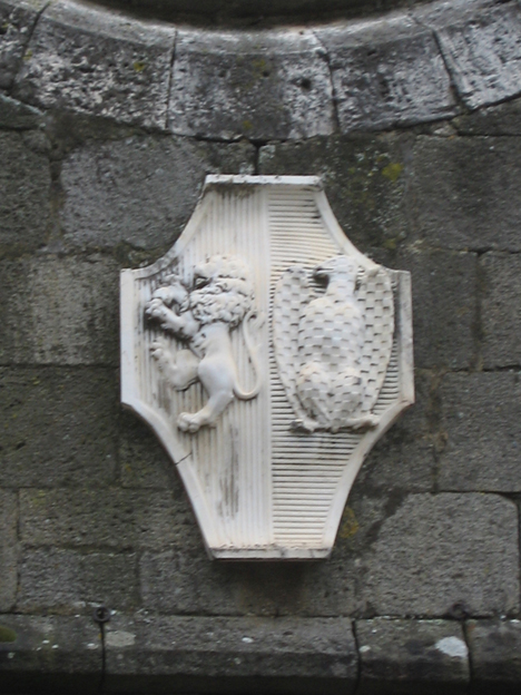 Pieve delle Sante Flora e Lucilla, Santa Fiora, Grosseto,Italy - Coats of arms